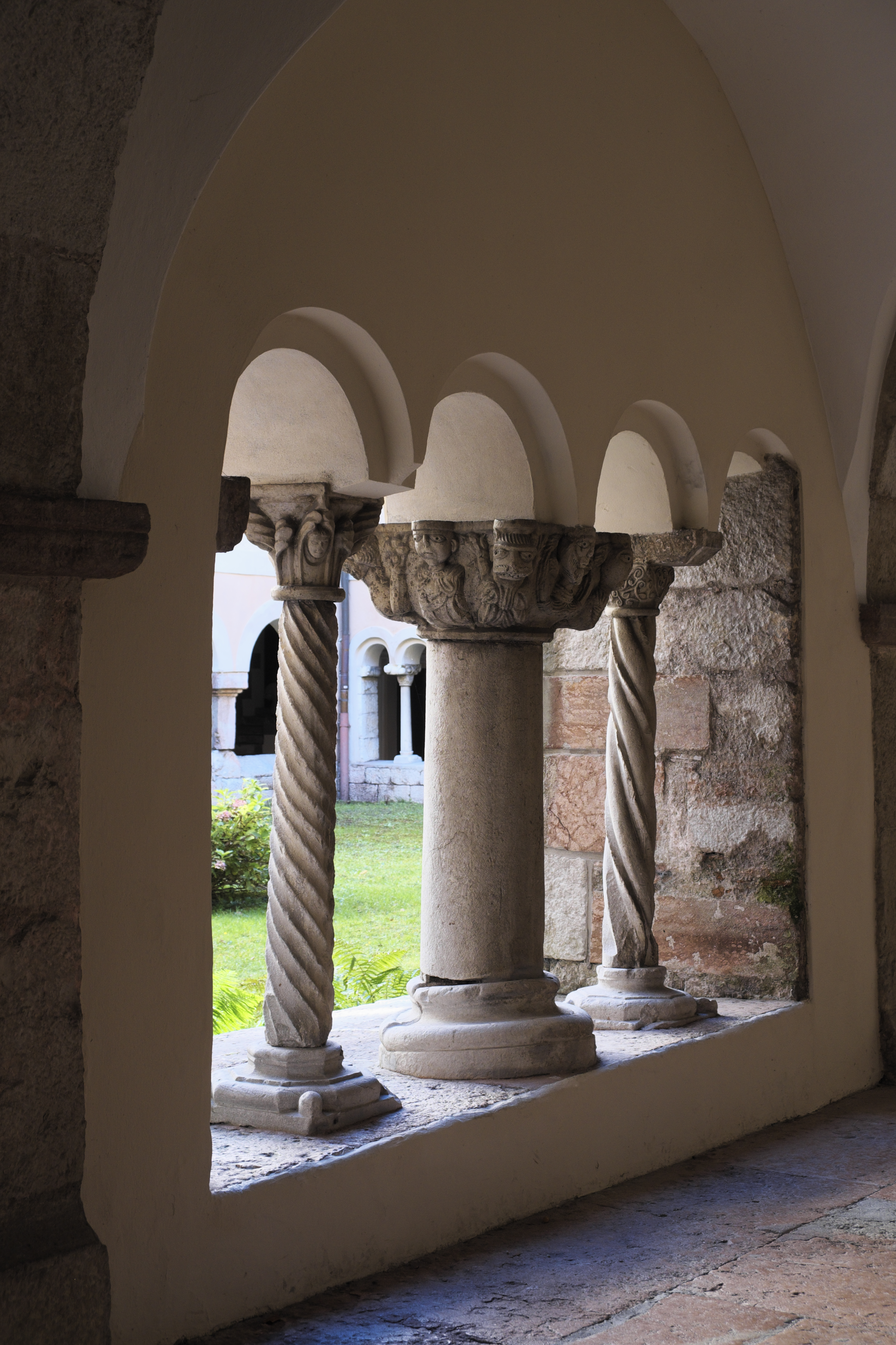 Kreuzgang des ehemaligen Augustiner-Chorherrenstiftes St. Peter und Johannes der Täufer, später Königliches Schloss Berchtesgaden, heute Museum, in Berchtesgaden im Landkreis Berchtesgadener Land (Bayern/Deutschland), Säulen